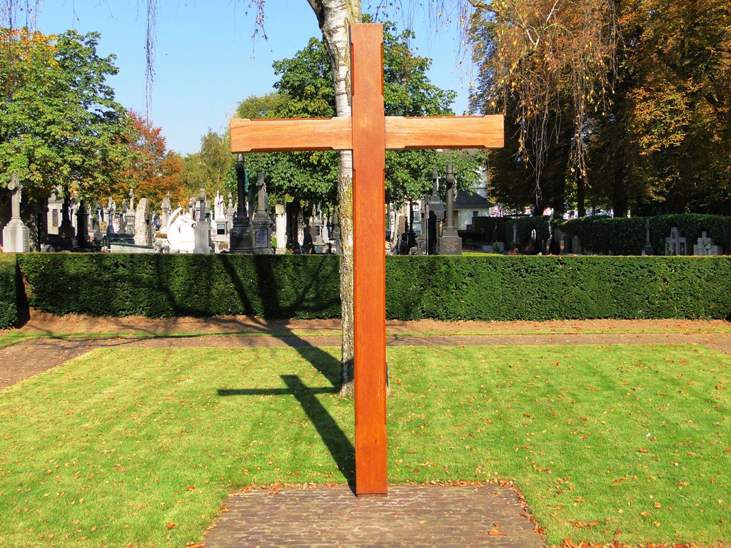 La Croix de Hinzert, assemblée à l'origine par des planches de barraques du camp de concentration, a été inaugurée le 10 mars 1946, à la suite du transfert à Luxembourg des dépouilles des victimes de Hinzert.